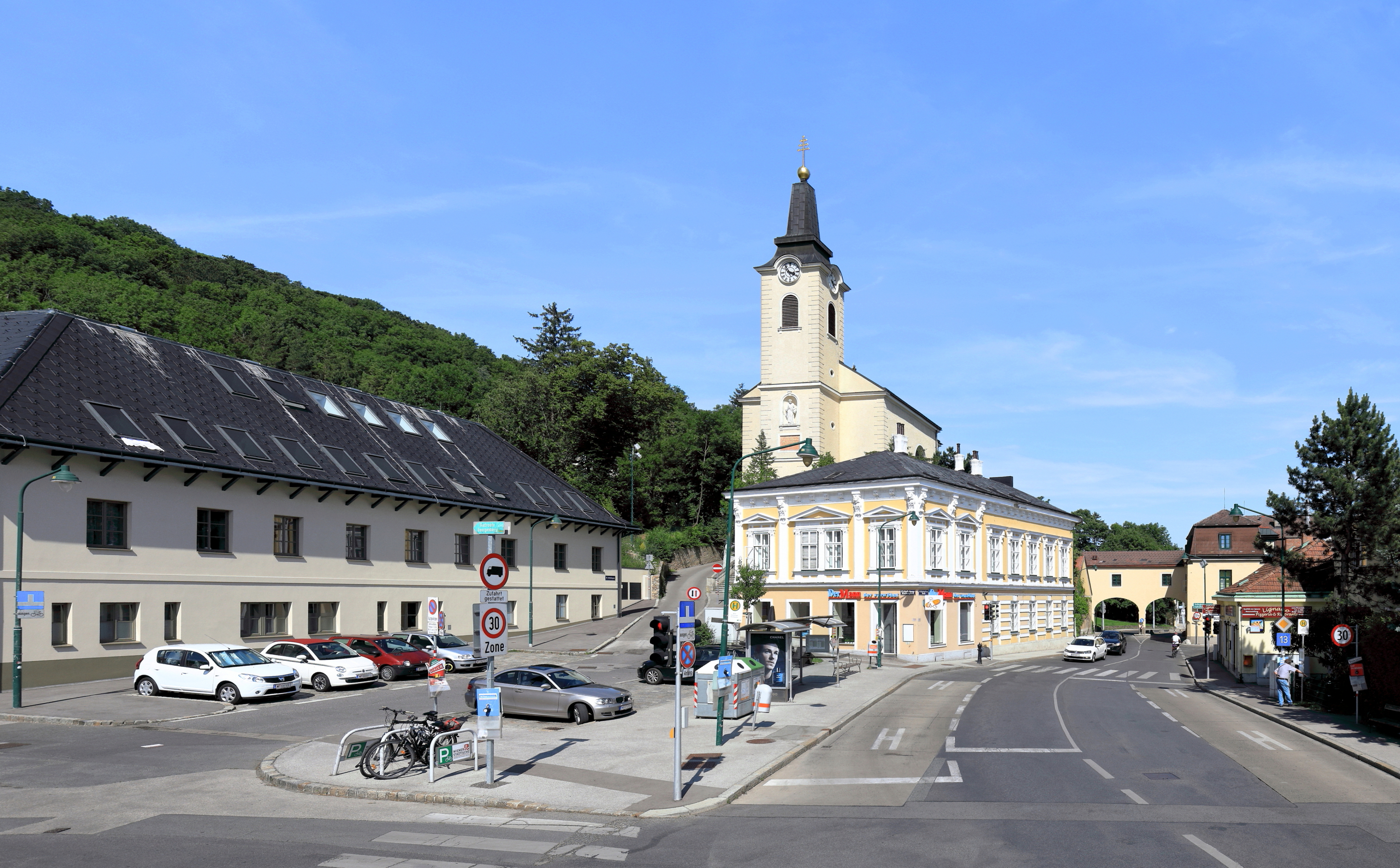 Das Ortszentrum von der ehemaligen eigenständigen Gemeinde Kalksburg mit der in erhöhter Lage errichteten röm.-kath. Pfarrkirche hl. Petrus im 23. Wiener Gemeindebezirk Liesing. Links der Kalksburg-Kirchenplatz und rechts die Breitenfurter Straße, über die der Schwibbogen des Mack-Schlössls errichtet ist.